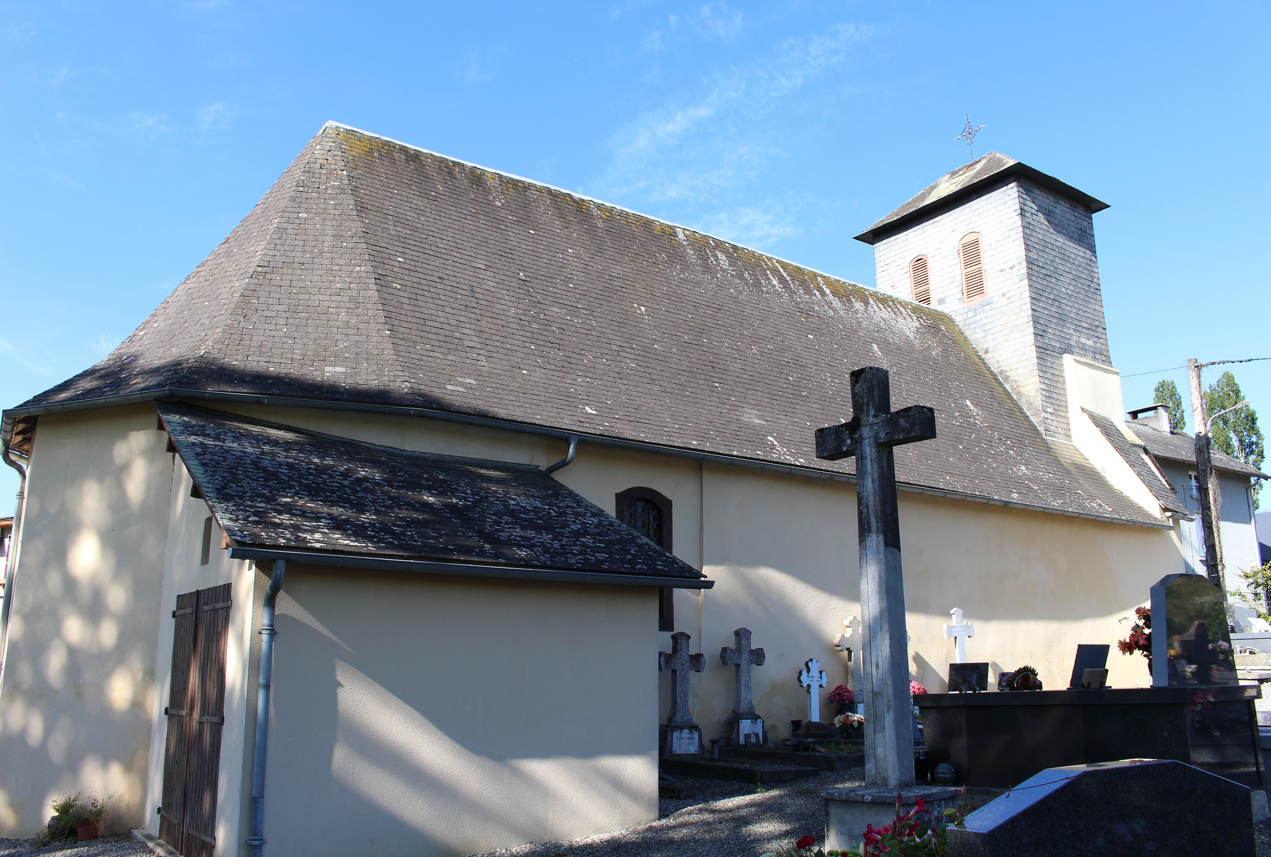 Église de l'Assomption d'Argelès-Bagnères (Hautes-Pyrénées)